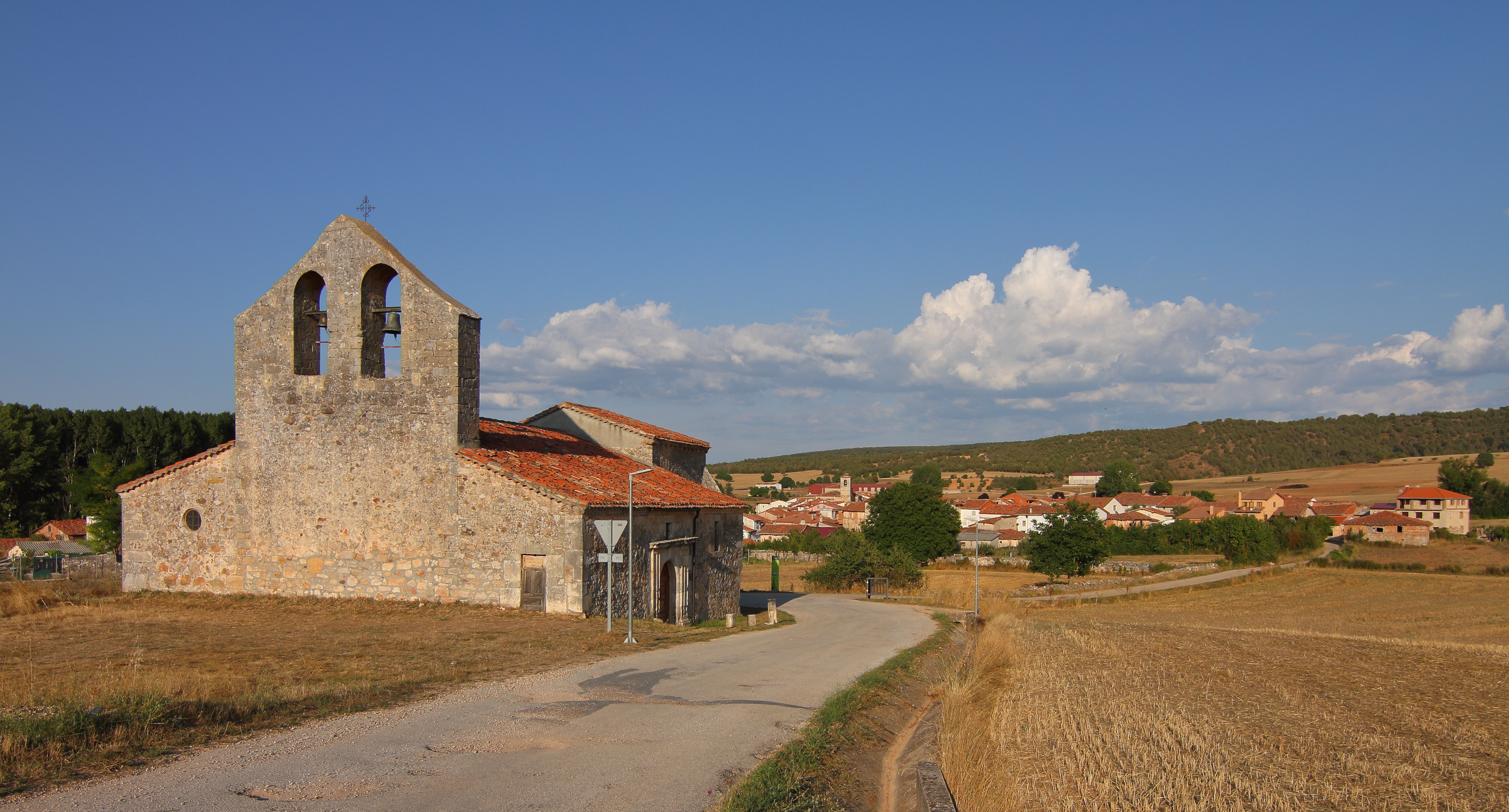 Retuerta, Ermita de Santa María, y población